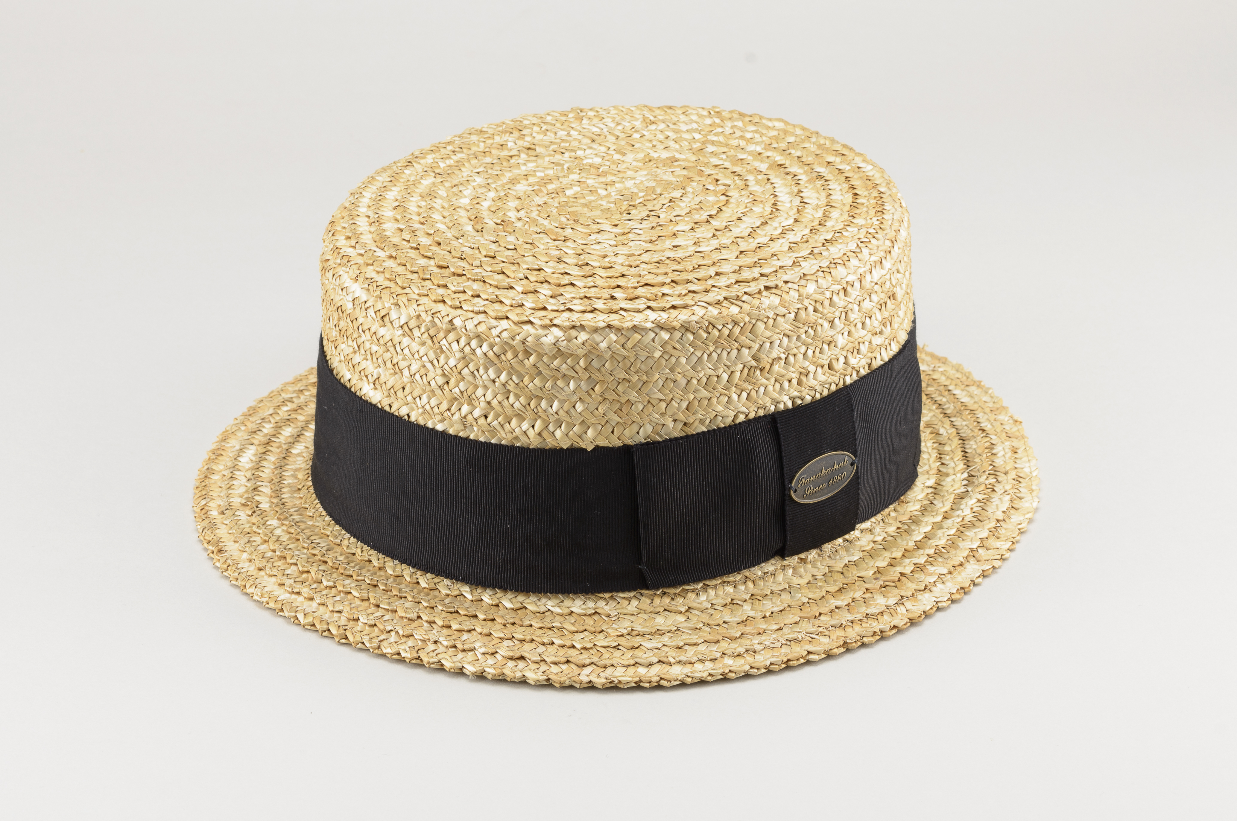 カンカン帽子 田中帽子店製